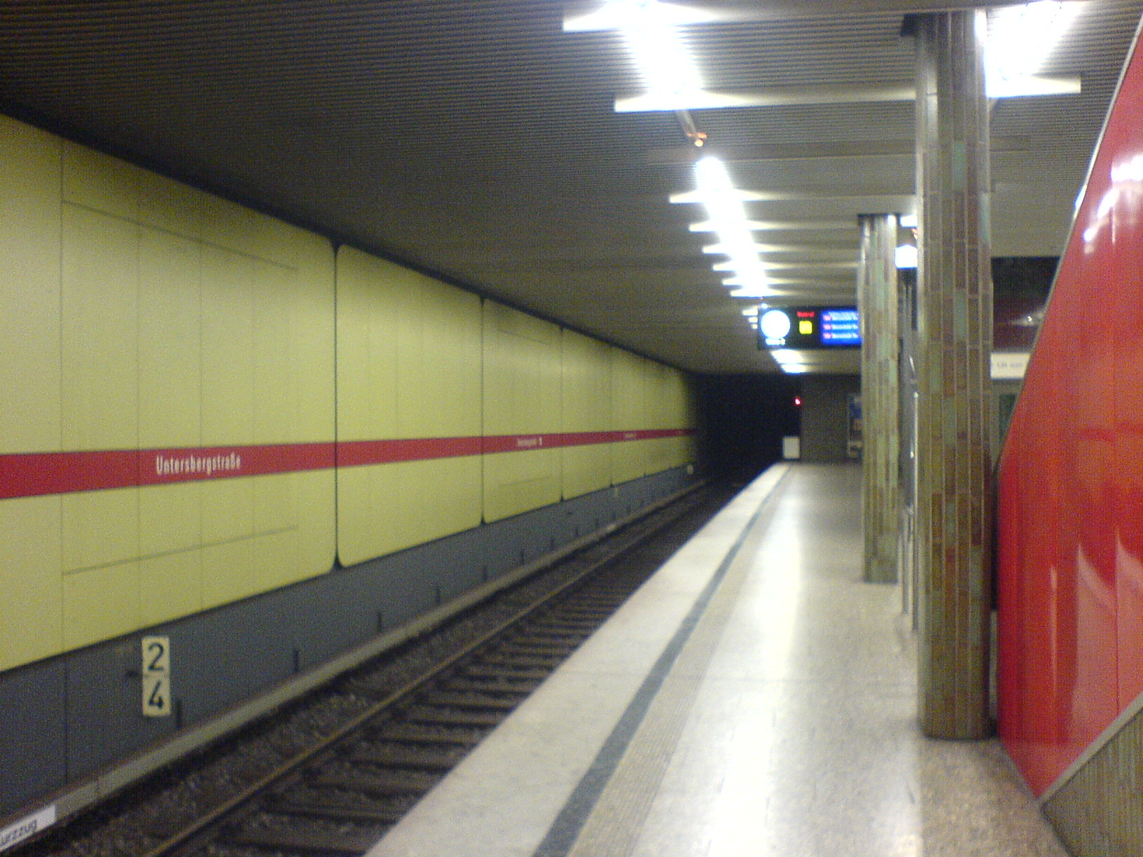 Bahnsteig des U-Bahnhofes Untersbergstraße in München-Giesing